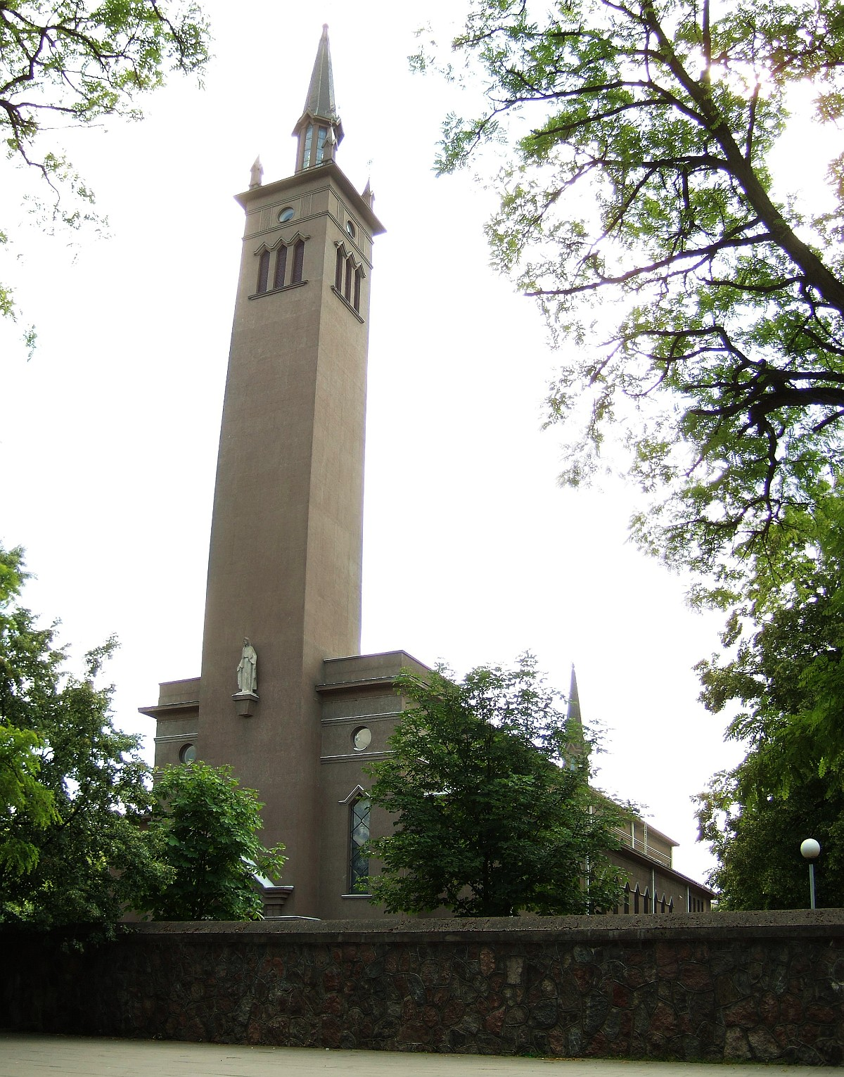 Klaipėdos Mergelės Marijos Taikos Karalienės bažnyčia